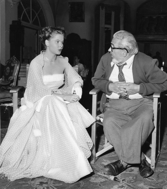 Aufnahmen von der Dreharbeiten des Film "Alles für Papa" (Regie Karl Hartl), der in den Göttinger Filmateliers im Oktober bis Dezember 1953 entstand. Hannerl Matz, die die Hauptrolle verkörpert, im Gespräch mit dem Regisseur Karl Hartl.